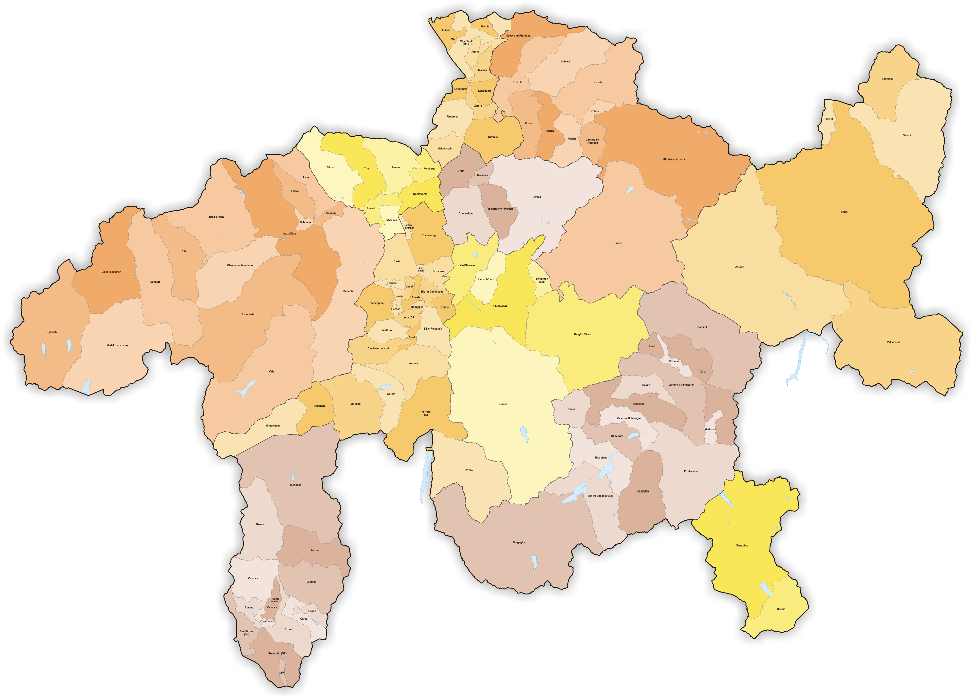 Municipalities in Canton Graubünden